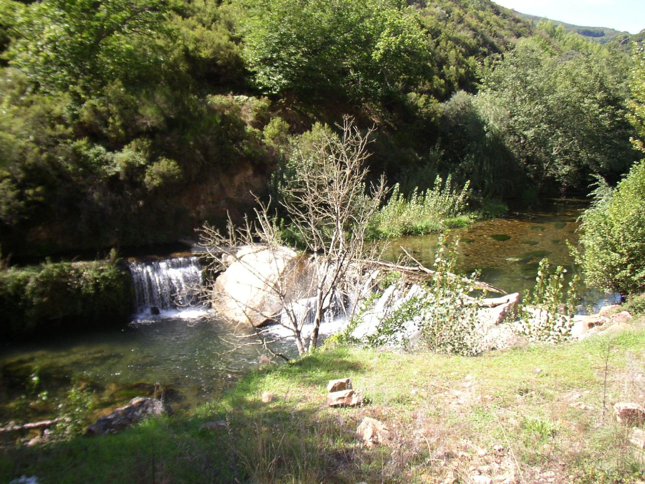 El río Valcarce cerca de Pereje.